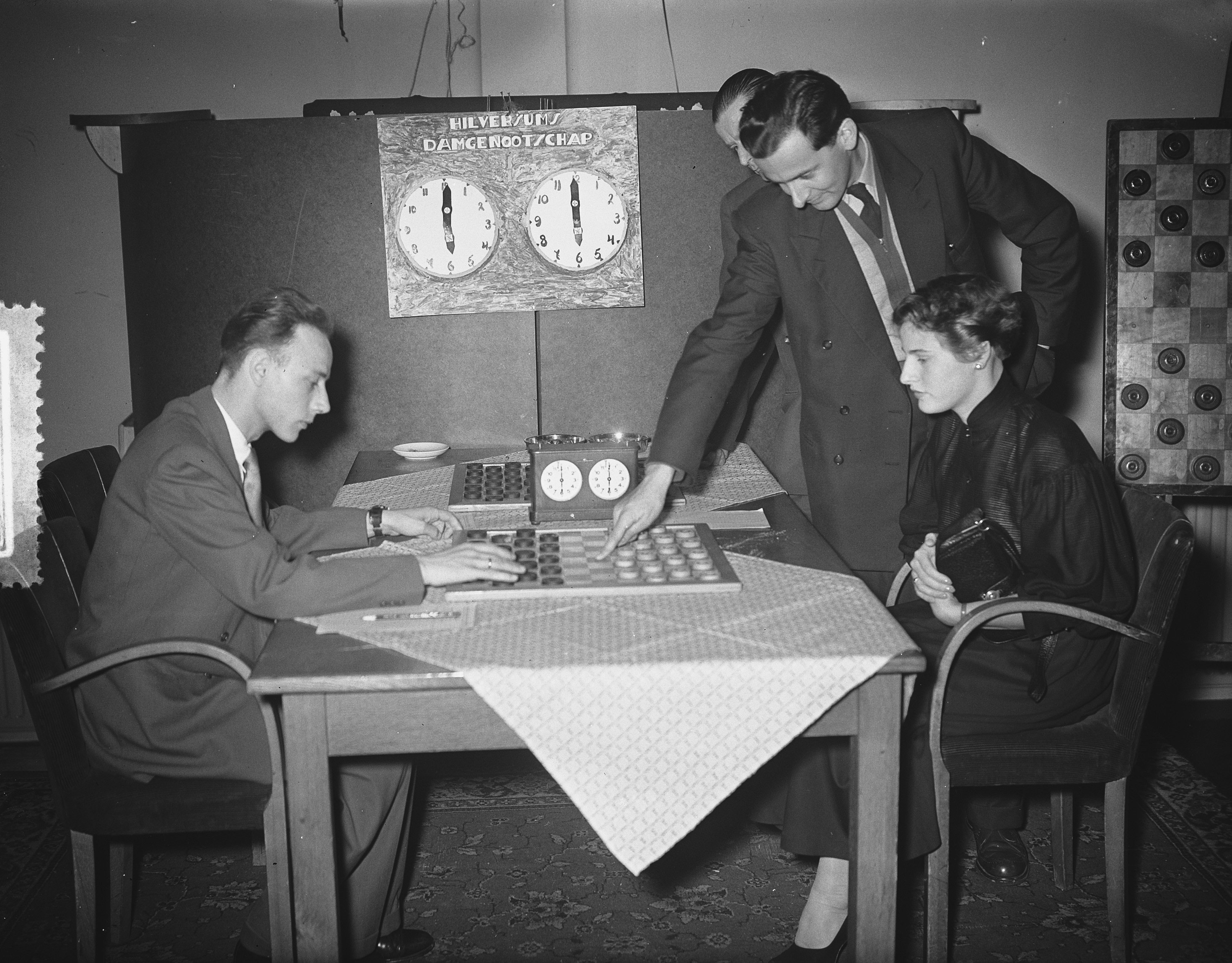 Collectie / Archief : Fotocollectie Anefo Reportage / Serie : [ onbekend ] Beschrijving : Wereldkampioenschappen dammen Hilversum, Geertje Wielema doet eerste zet Datum : 19 oktober 1954 Locatie : Hilversum Trefwoorden : DAMMEN, wereldkampioenschappen Persoonsnaam : Geertje Wielema Fotograaf : Bilsen, Joop van / Anefo Auteursrechthebbende : Nationaal Archief Materiaalsoort : Glasnegatief Nummer archiefinventaris : bekijk toegang 2.24.01.09 Bestanddeelnummer : 906-7966